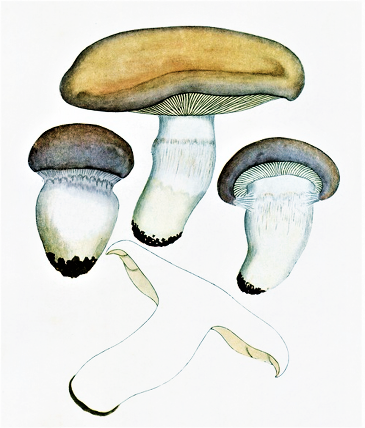 Giacomo Bresadola: Cortinarius balteatus (Fr.) Fr. (1838)